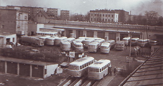 Stara zajezdnia PKS Nova